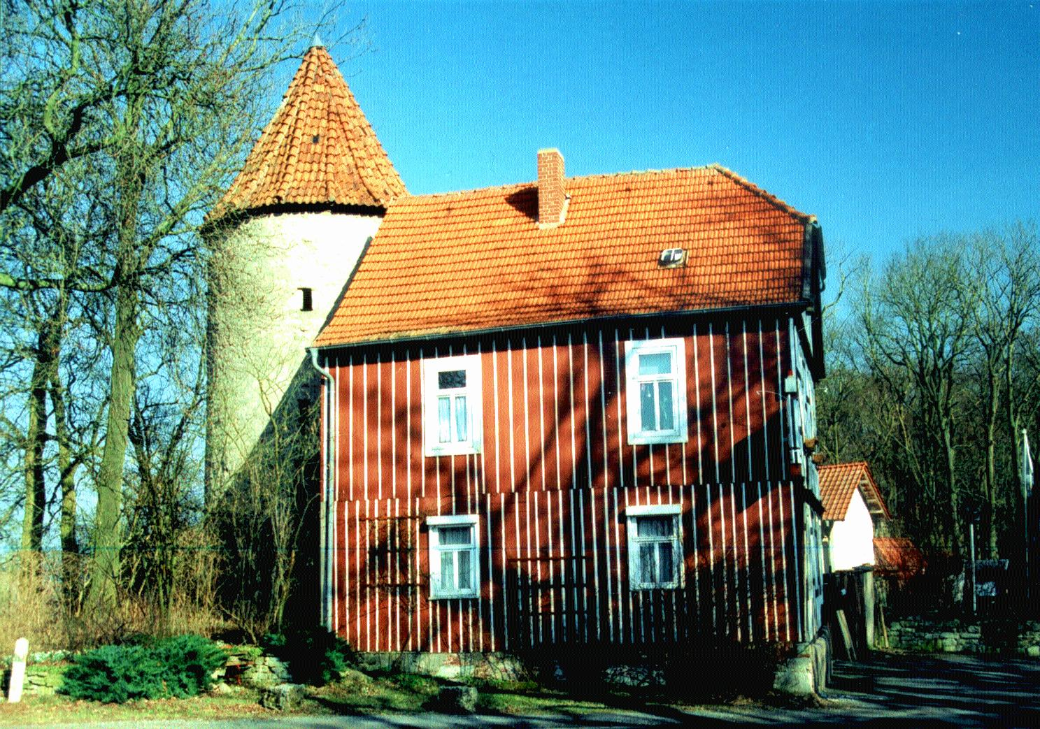 Lengefelder Warte mit ehemaligen Wirtshaus an der Grenze zum Kurmainzer Eichsfeld